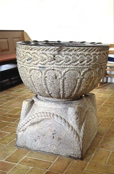 Gjern Kirke, Døbefont